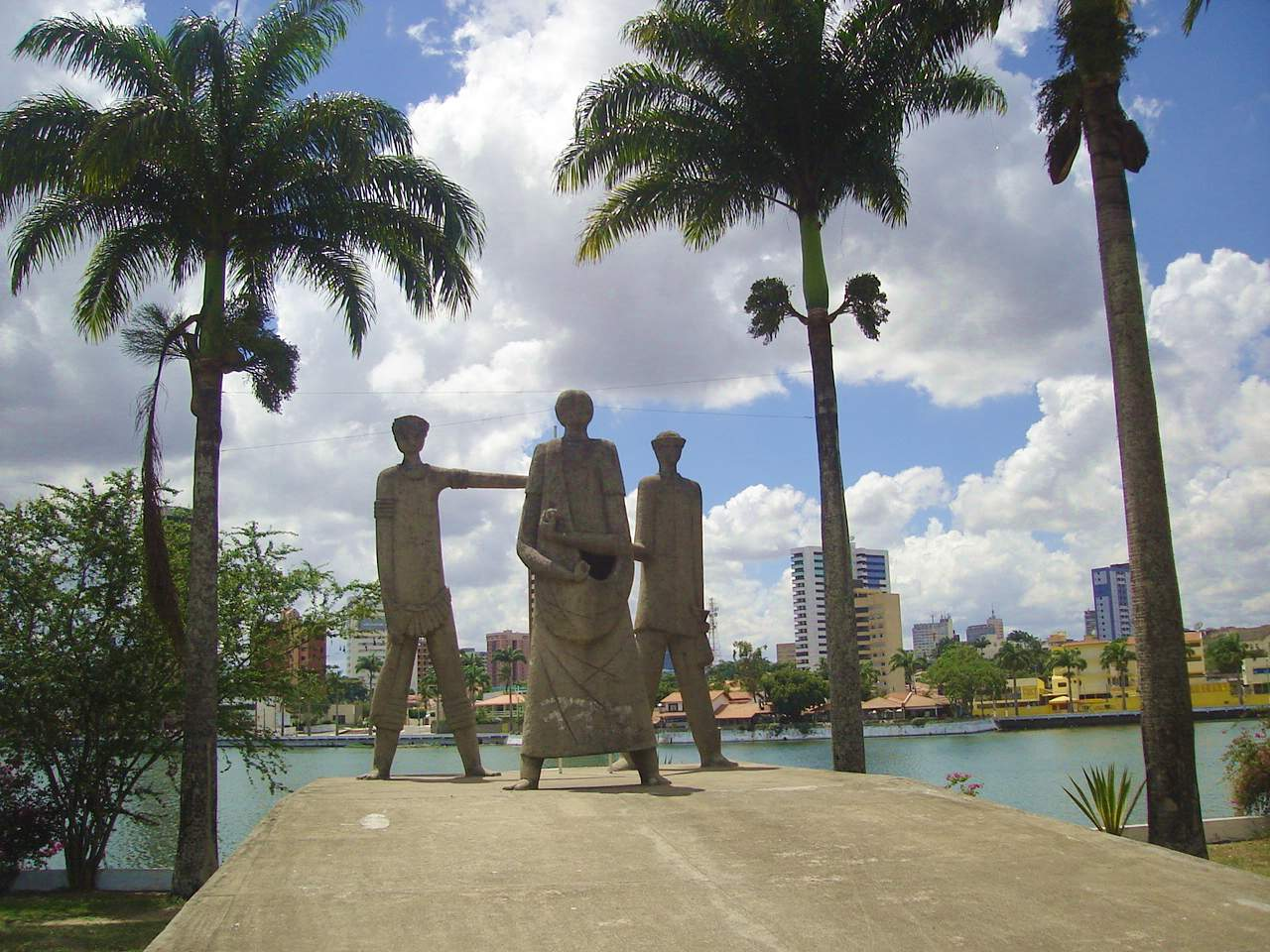 Açude Velho, Campina Grande - PB Ano: 2006. Author: Bruno Coitinho Araújo